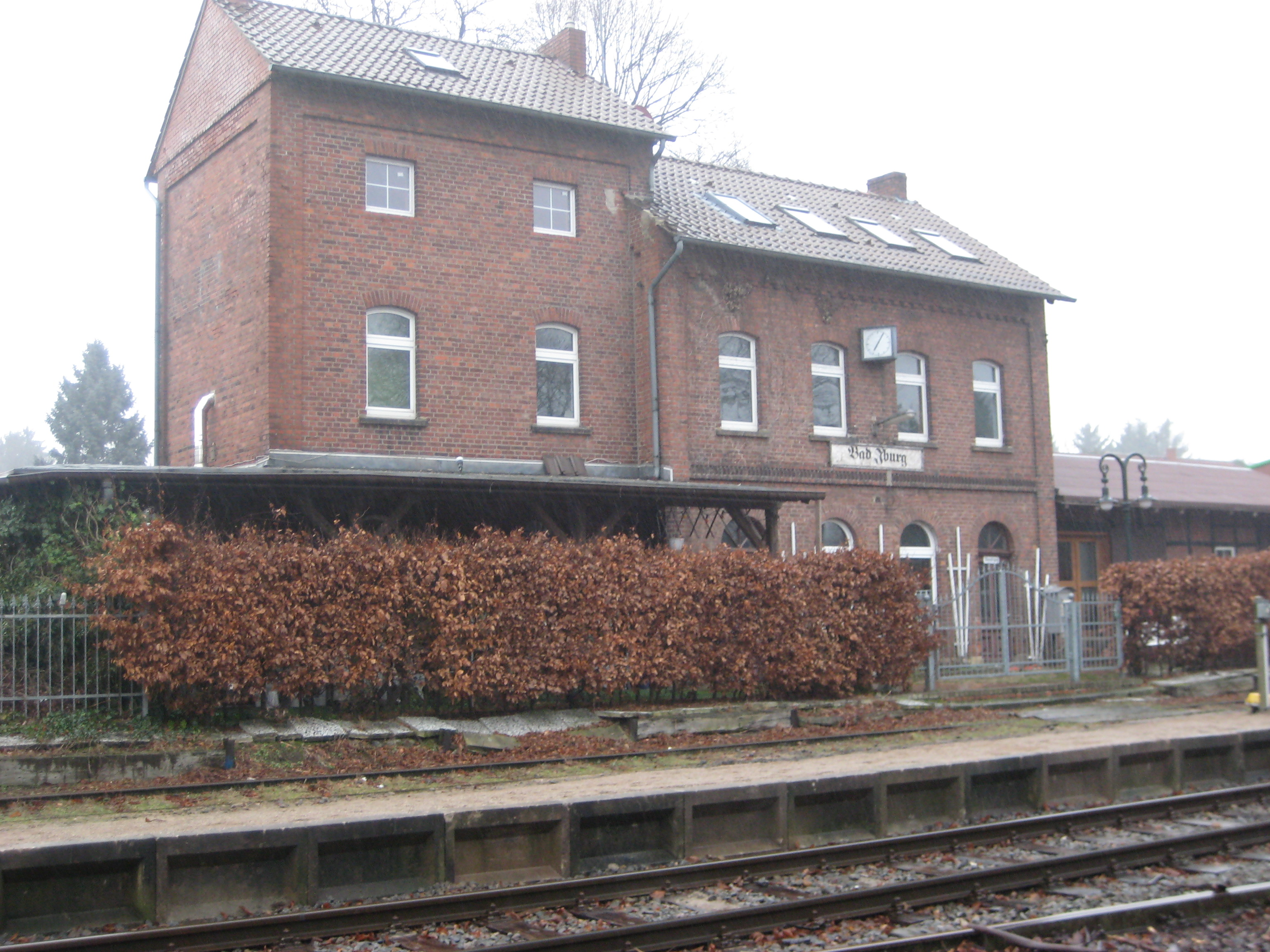 Ehemaliger Bahnhof der Teutoburger Wald-Eisenbahn in Bad Iburg